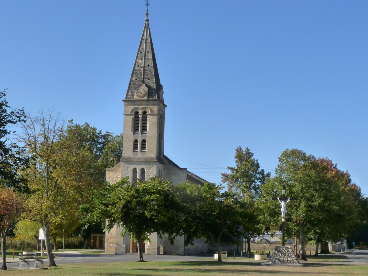 église de Naujac-sur-Mer, Gironde, France